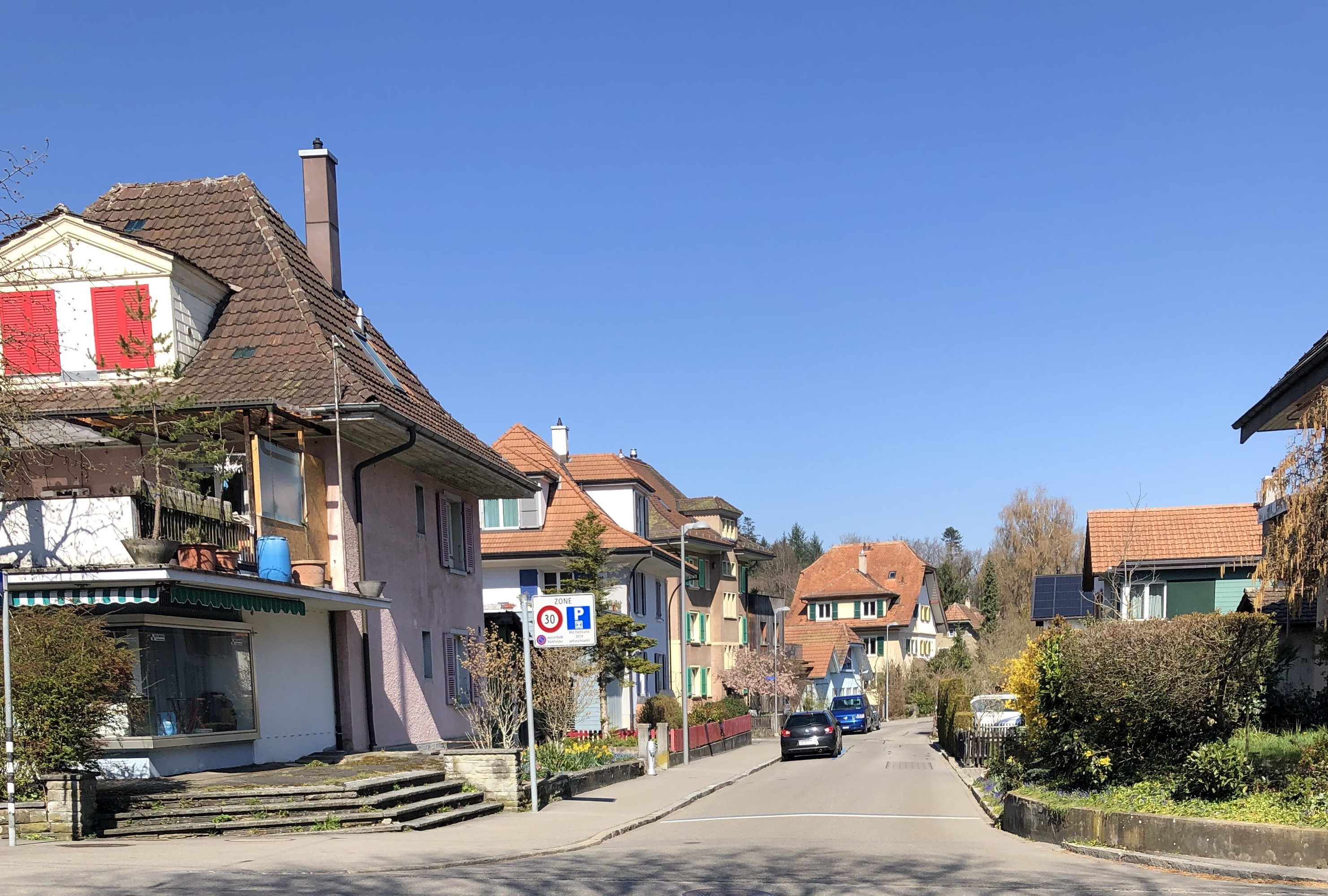 Winterhale Bebaung Siedlung